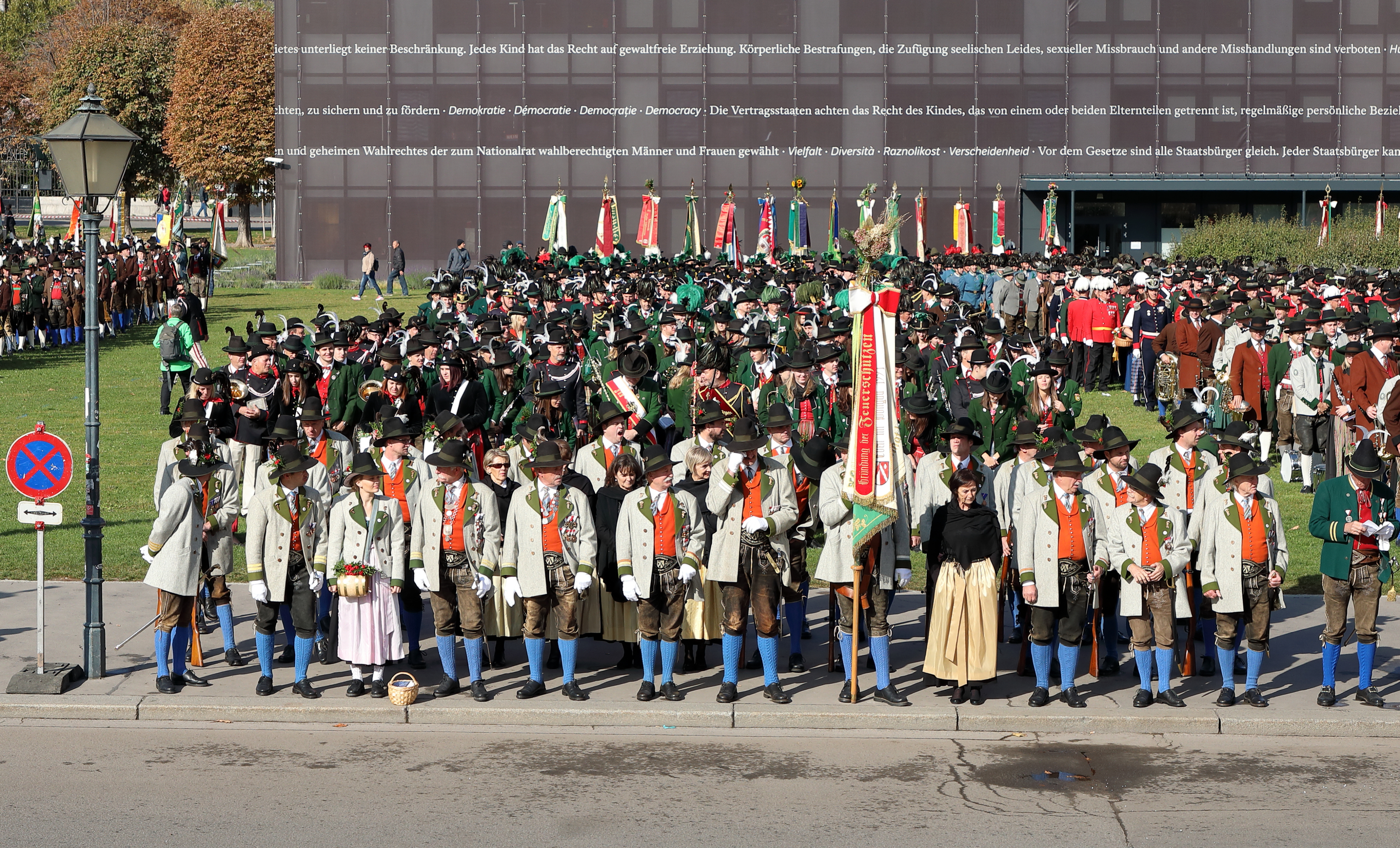 Der Festakt „100 Jahre Republik Österreich“ mit Salzburger Schützen am Heldenplatz im 1. Wiener Bezirk Innere Stadt. Im Bild die Abordnung der Schützen aus dem Bezirk St. Johann im Pongau mit den Feuerschützen aus Eben im Pongau im Vordergrund. Bei dem Festakt am 21. Okt. 2018 nahmen fast 4.000 Salzburger Frauen, Männer und Jugendliche in Trachten (87 Schützenkompanien und 26 Musikkapellen), neben kleineren Abordnungen aus anderen Bundesländern, teil.